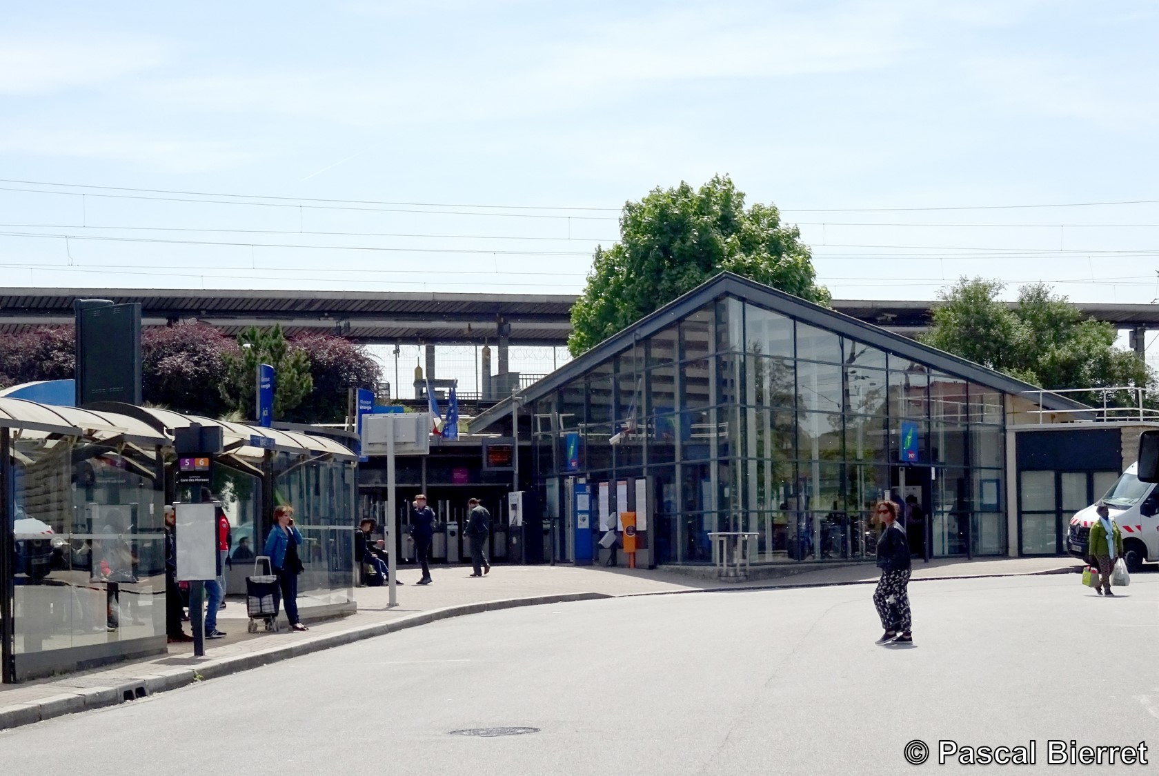 Gare des Mureaux - Yvelines (France)